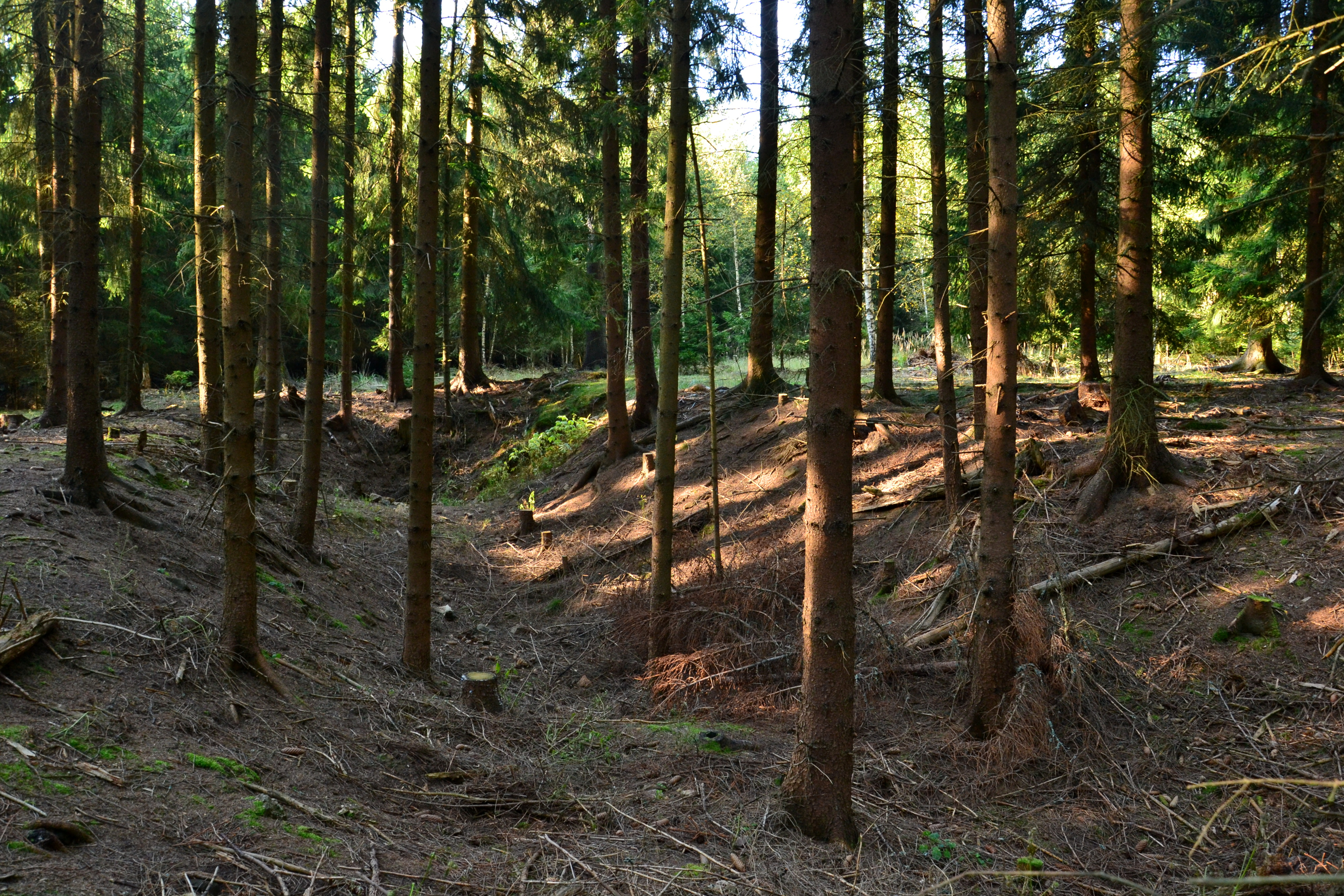 Zaniklá ves Rovný – sklepení hospodářského dvora